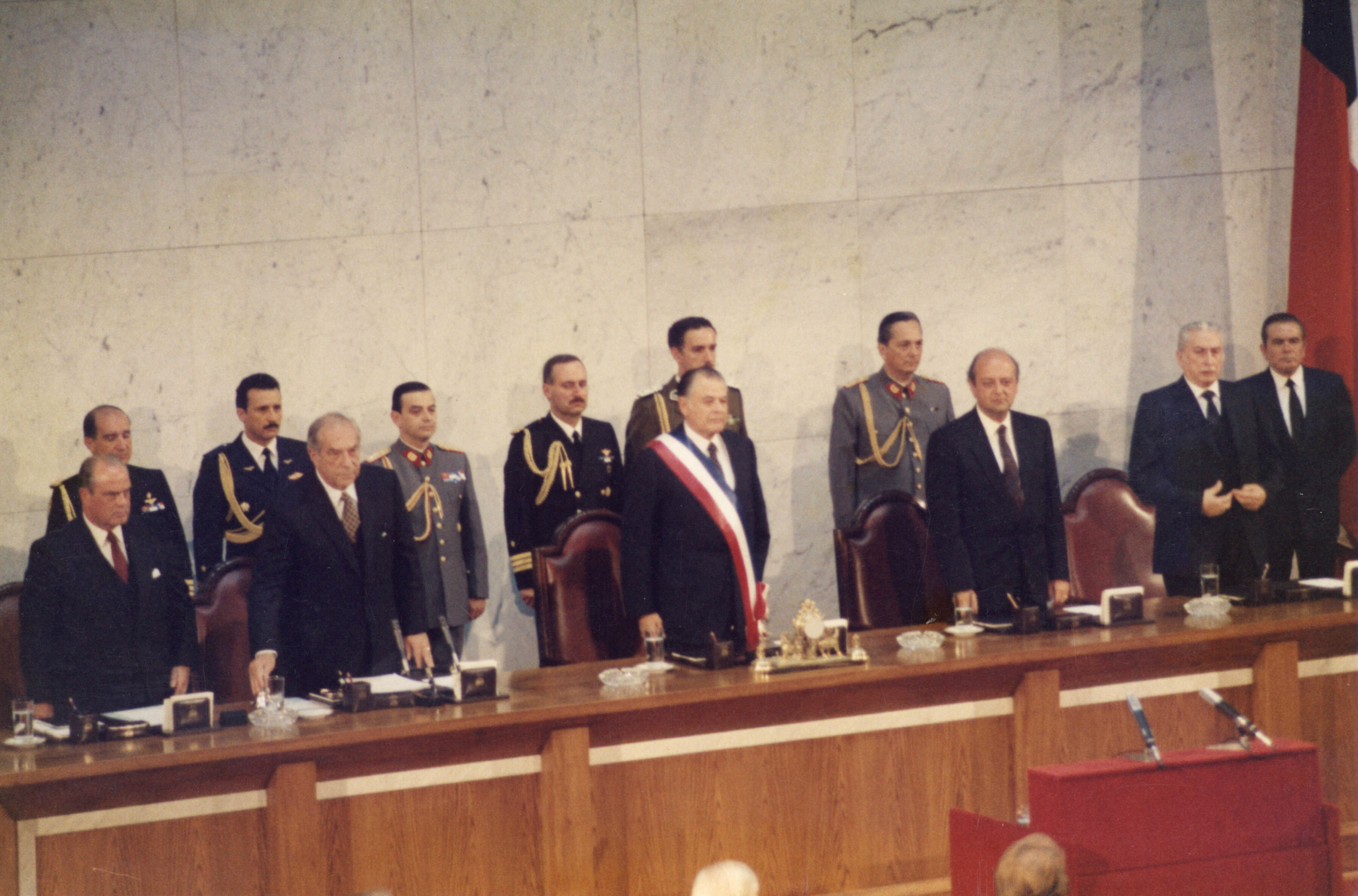 Gabriel Valdés como presidente del Senado chileno.